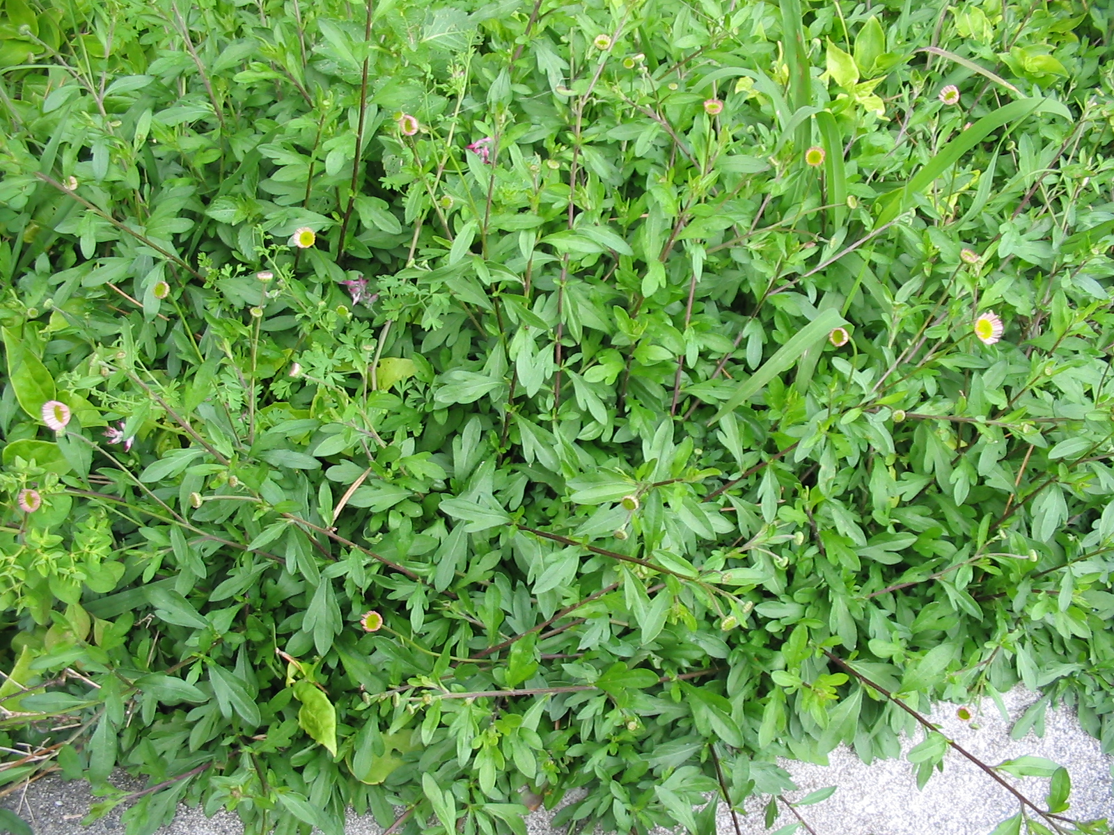 Karwinskis Berufskraut (Erigeron karvinskianus) - Habitus